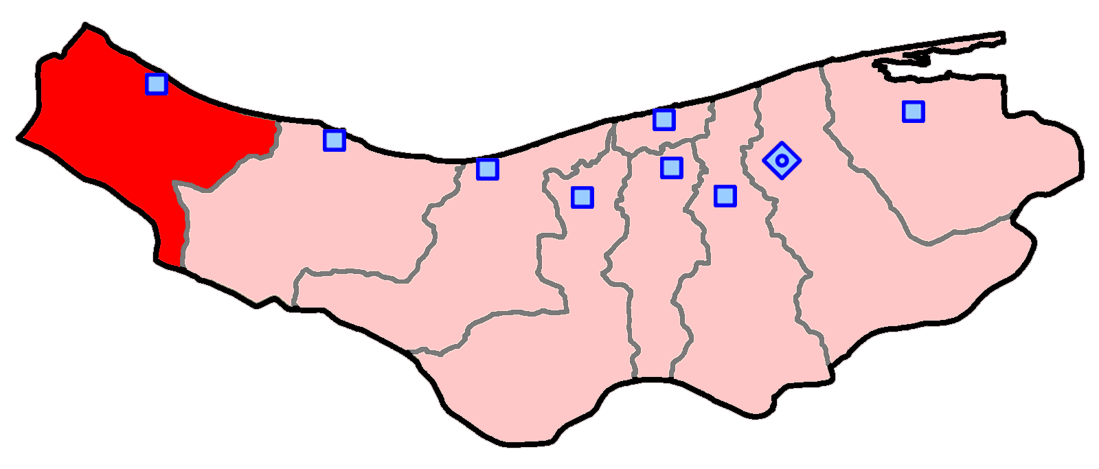 حوزهٔ انتخاباتی تنکابن و رامسر و عباس‌آباد برای انتخابات مجلس شورای اسلامی